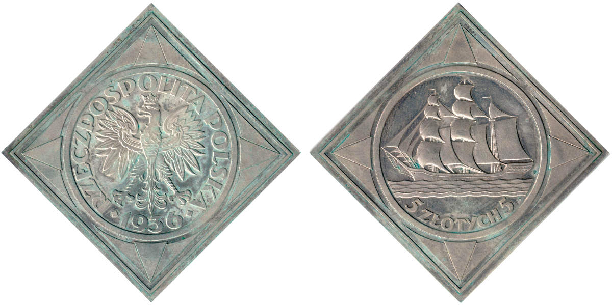 Klipa 5 zlotych Zaglowiec